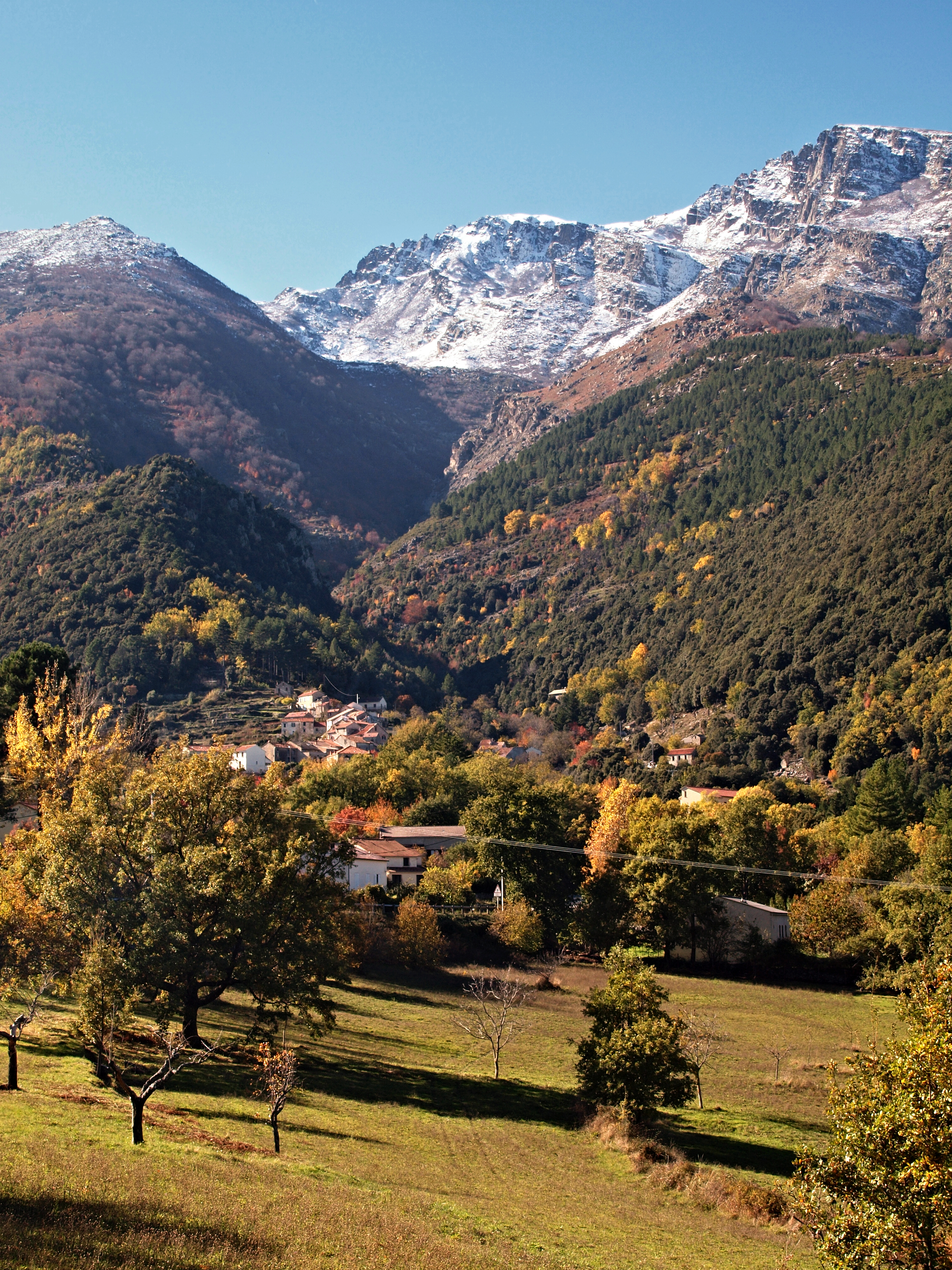 Santo-Pietro-di-Venaco (Corsica) - Vue du village, dominé par Monte Cardo (2453 m) et Punta Lattiniccia (2413 m)